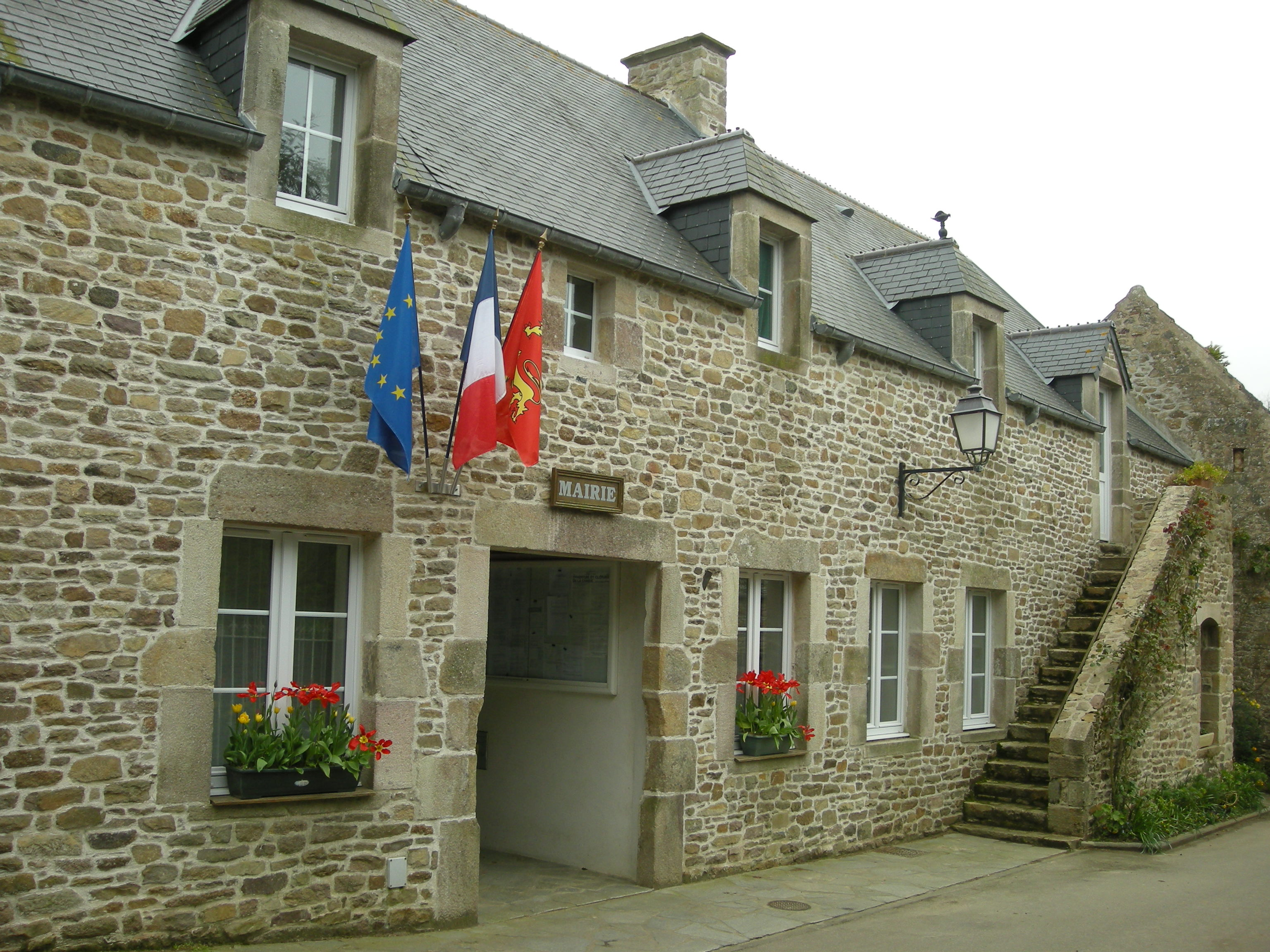 Mairie d'Omonville-la-Petite (département de la Manche)